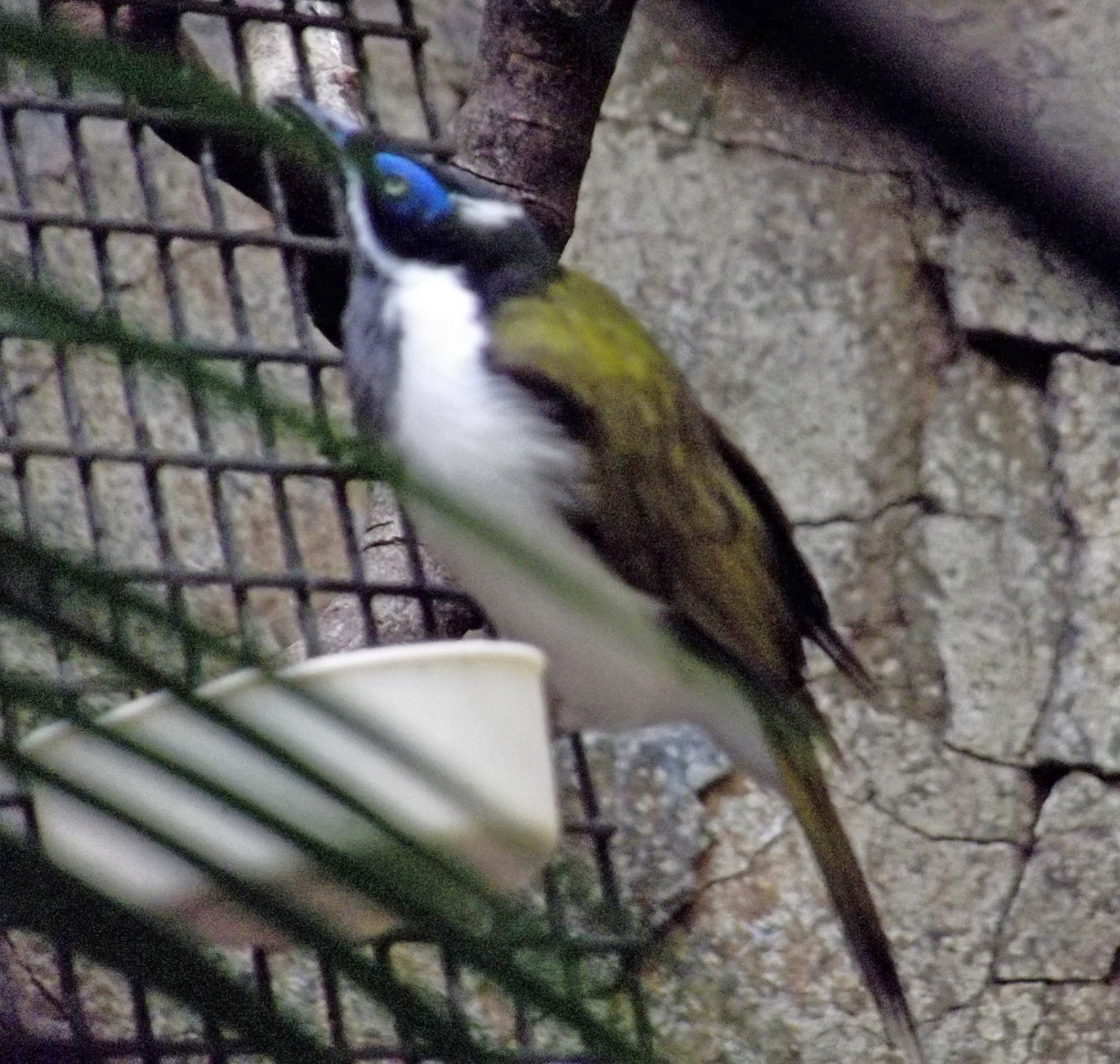 Méliphage à oreillons bleus au zoo d'Edimbourg